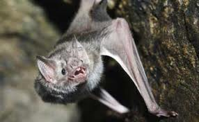 Desmodus rotundus Nedersaksisch: Vampiervleermuis